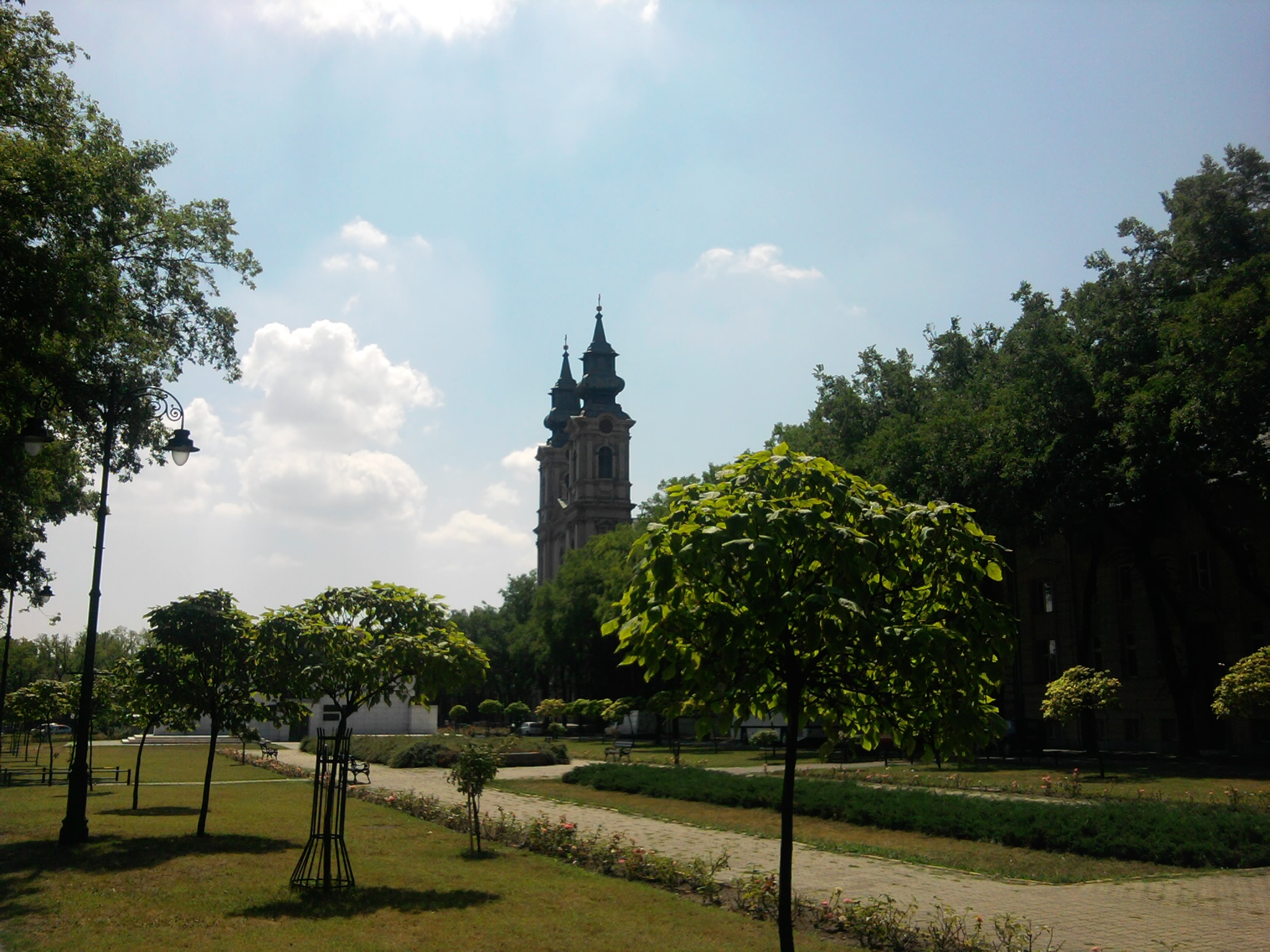 Szabadkai római katolikus templom (Vajdaság, Szerbia)